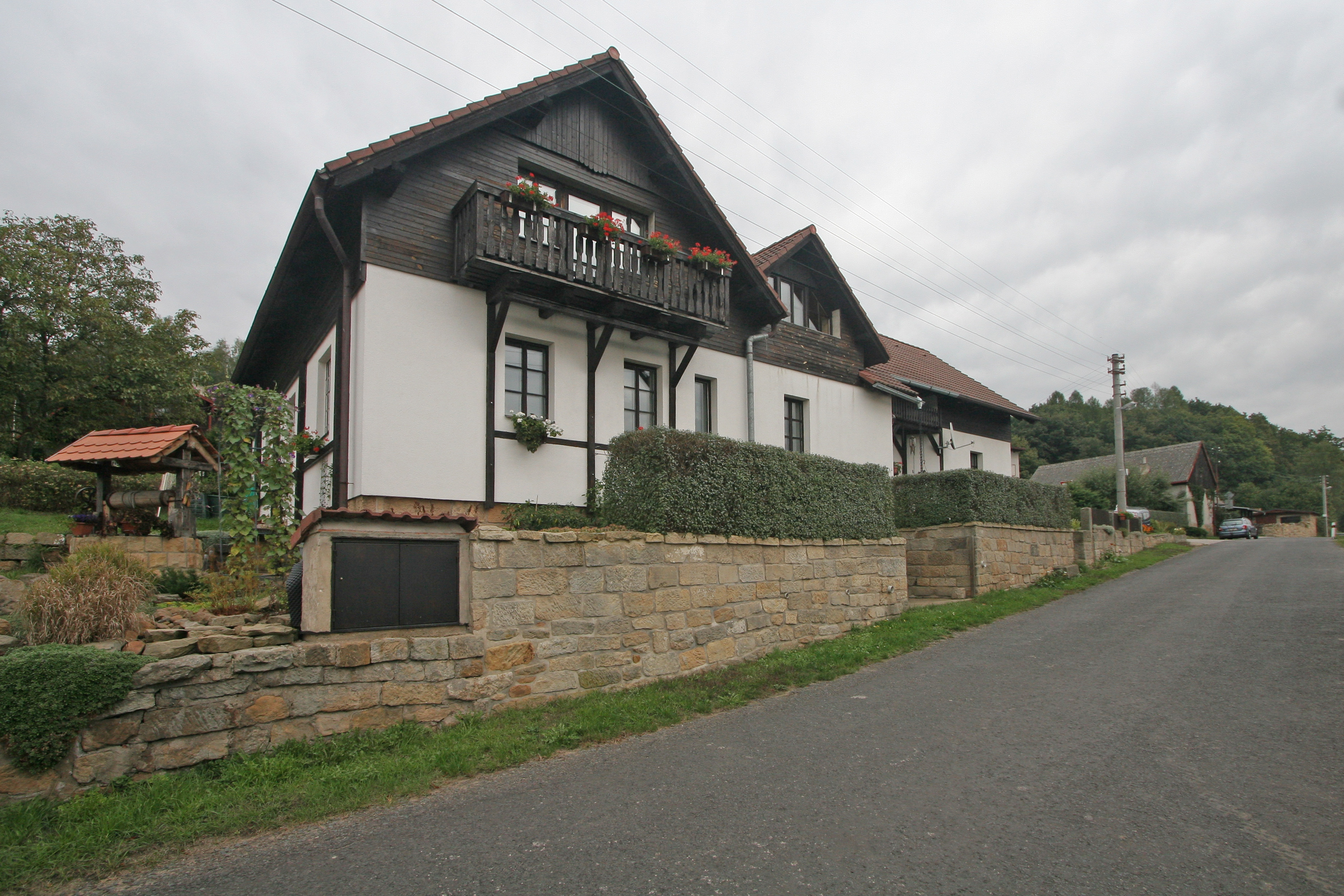 Chloumek čp. 17